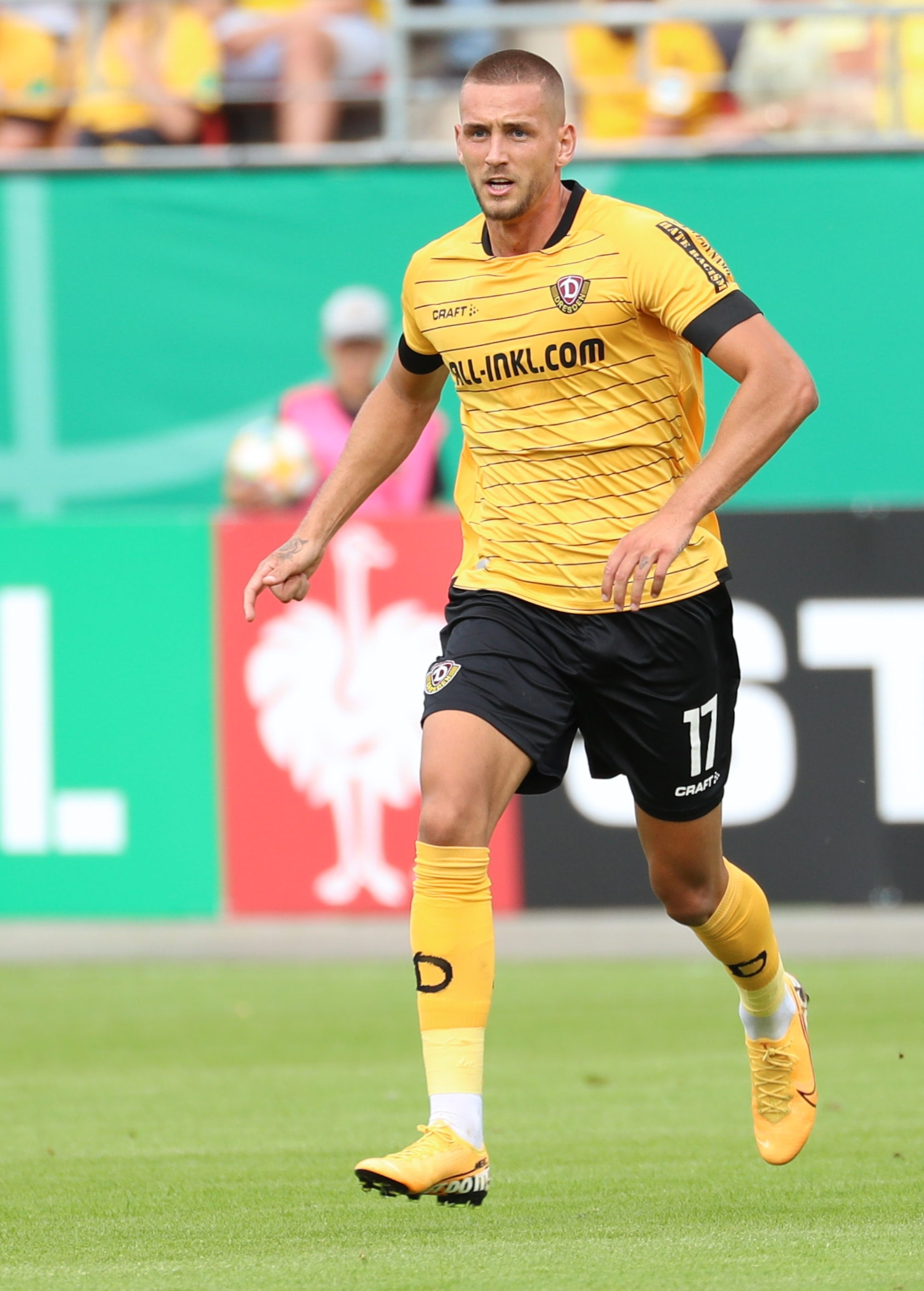 DFB-Pokal 2019/20, 1. Hauptrunde, TuS Dassendorf gegen SG Dynamo Dresden 0:3 (0:1)